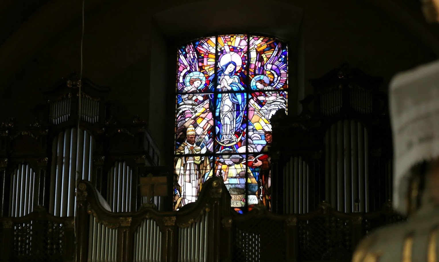 Szent Anna-templom (esztergomi ferences templom)